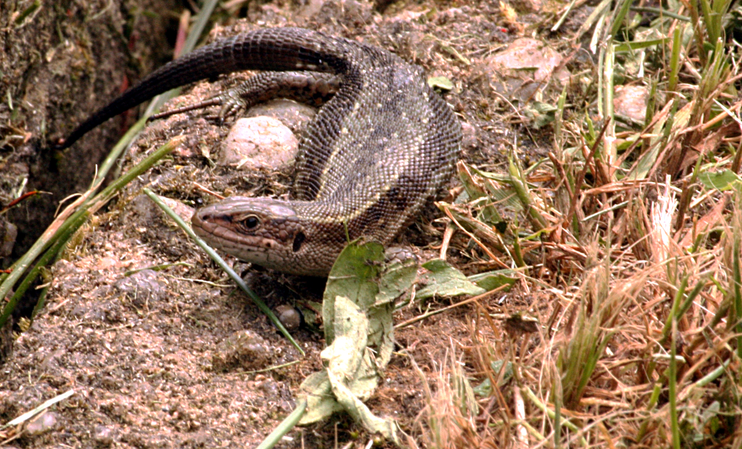 Eidechse